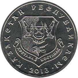 Монета Казахстана Костанай